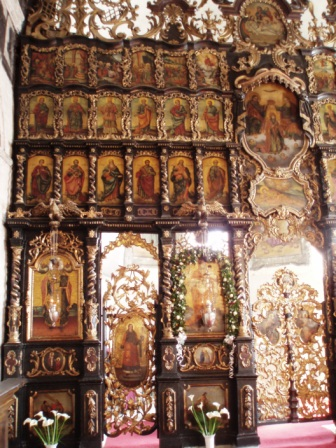 Фотографија иконостаса Николајевске цркве у Земуну аутора Димитрија Бачевића из 1762. године (детаљ 1.), аутор фотографије: Nicolo